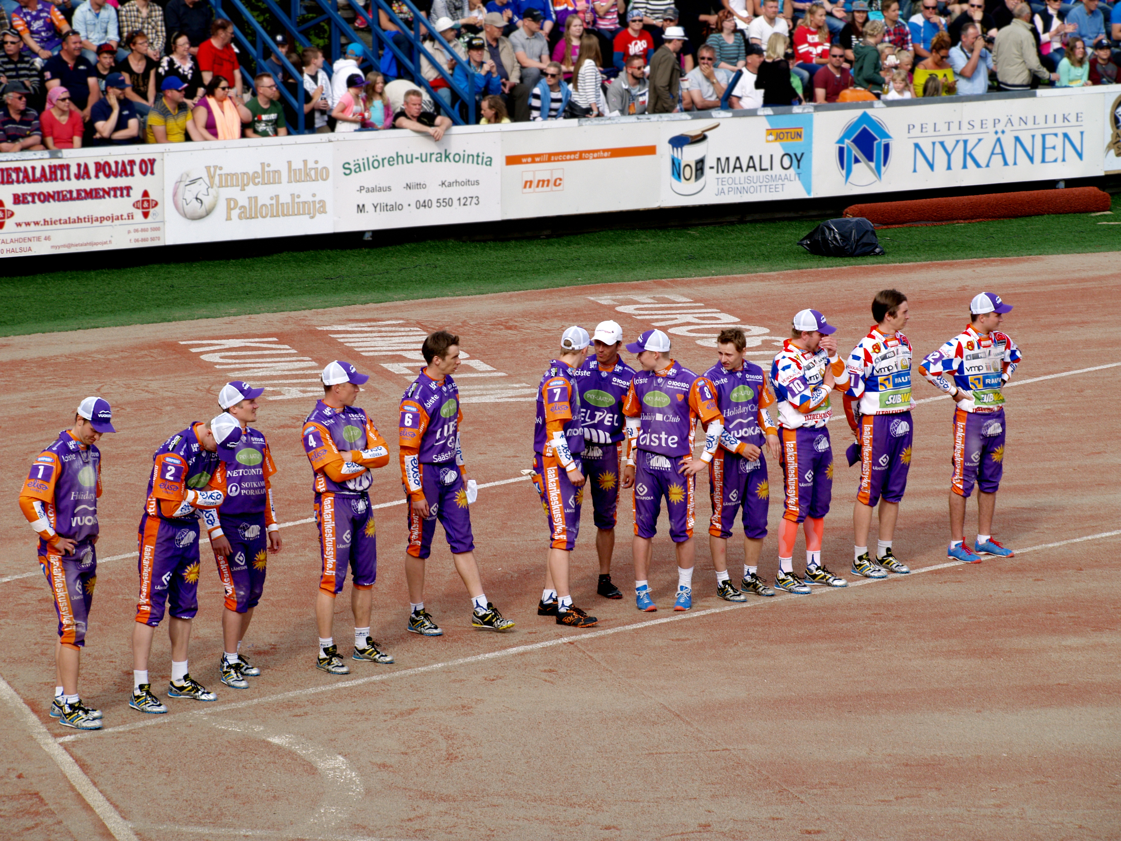 Vimpelin Veto - Sotkamon Jymy pesäpallo-ottelu 19.7.2015. Kuvassa: Niilo Piiponniemi, Niko Korhonen, Antti Hartikainen, Jani Komulainen, Immo Rautiainen, Markus Tuikka, Toni Kohonen, Onni Määttä, Janne Hyvönen, Roope Korhonen, Kosti Rautiainen ja Niko J. Korhonen.